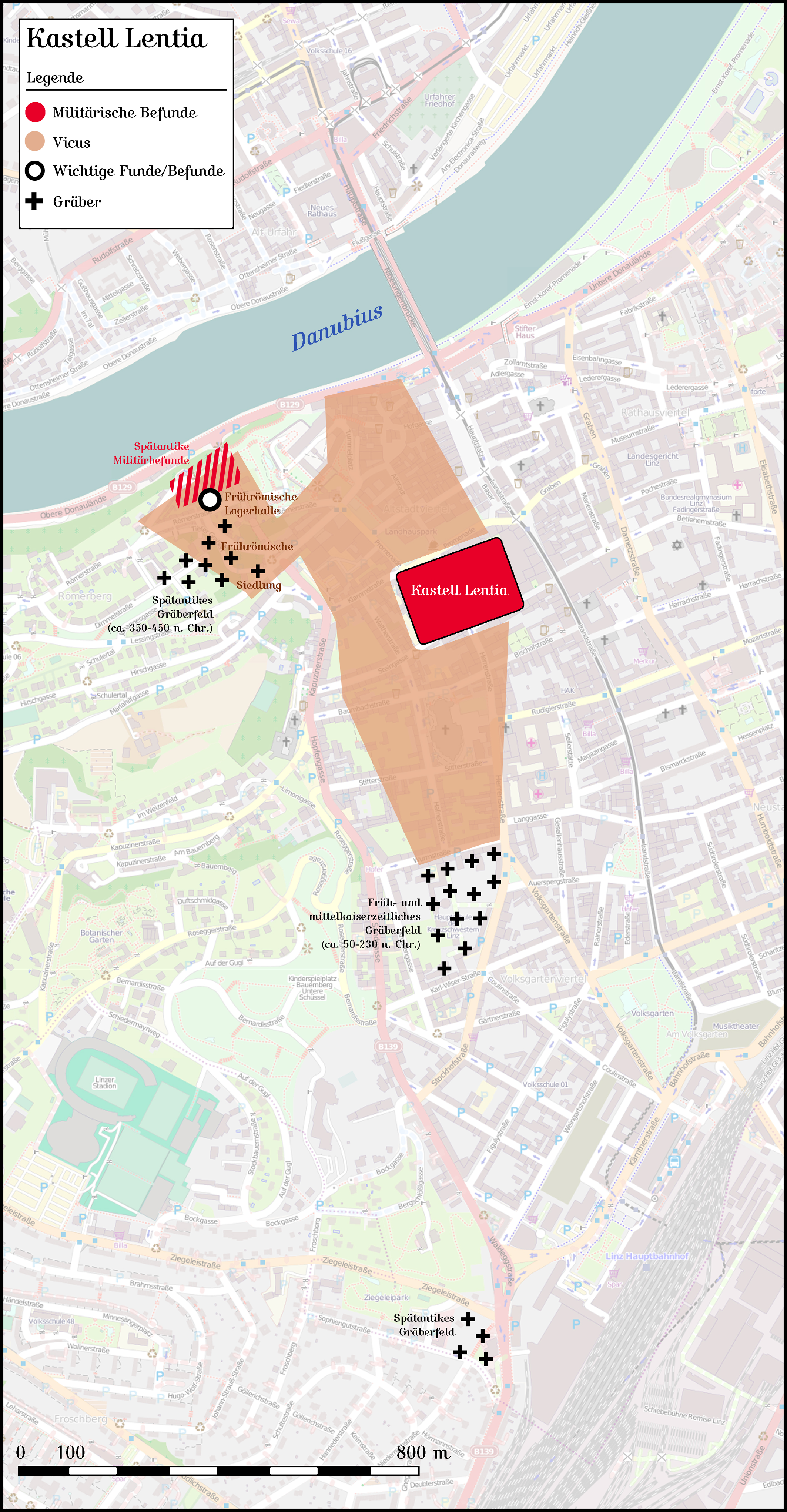 Lage des Kastells Lentia und wichtige Siedlungsbefunde in der Altstadt von Linz. Gezeichnet mit Photoshop CS. Hintergrundkarte aus dem freien Internetprojekt [1]. Quellen: E. M. Ruprechtsberger: Ausgrabungen im antiken Lentia. Die Funde aus Linz-Tiefer Graben/Flügelhofgasse. LAF 20 (1992); E. M. Ruprechtsberger: Neue Beiträge zum römischen Kastell von Lentia/Linz. LAF 36 (2005).